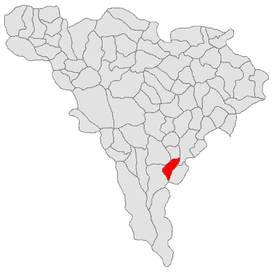 Categorie:Hărţi ale judeţului Alba